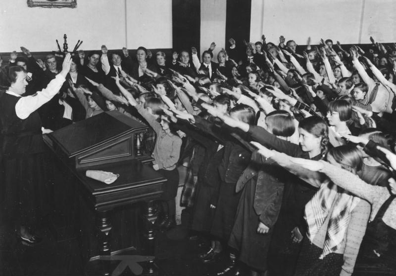 Reichsgründungsfeier in der 5. Volksschule in der Alten Jakobstraße, 2085-34